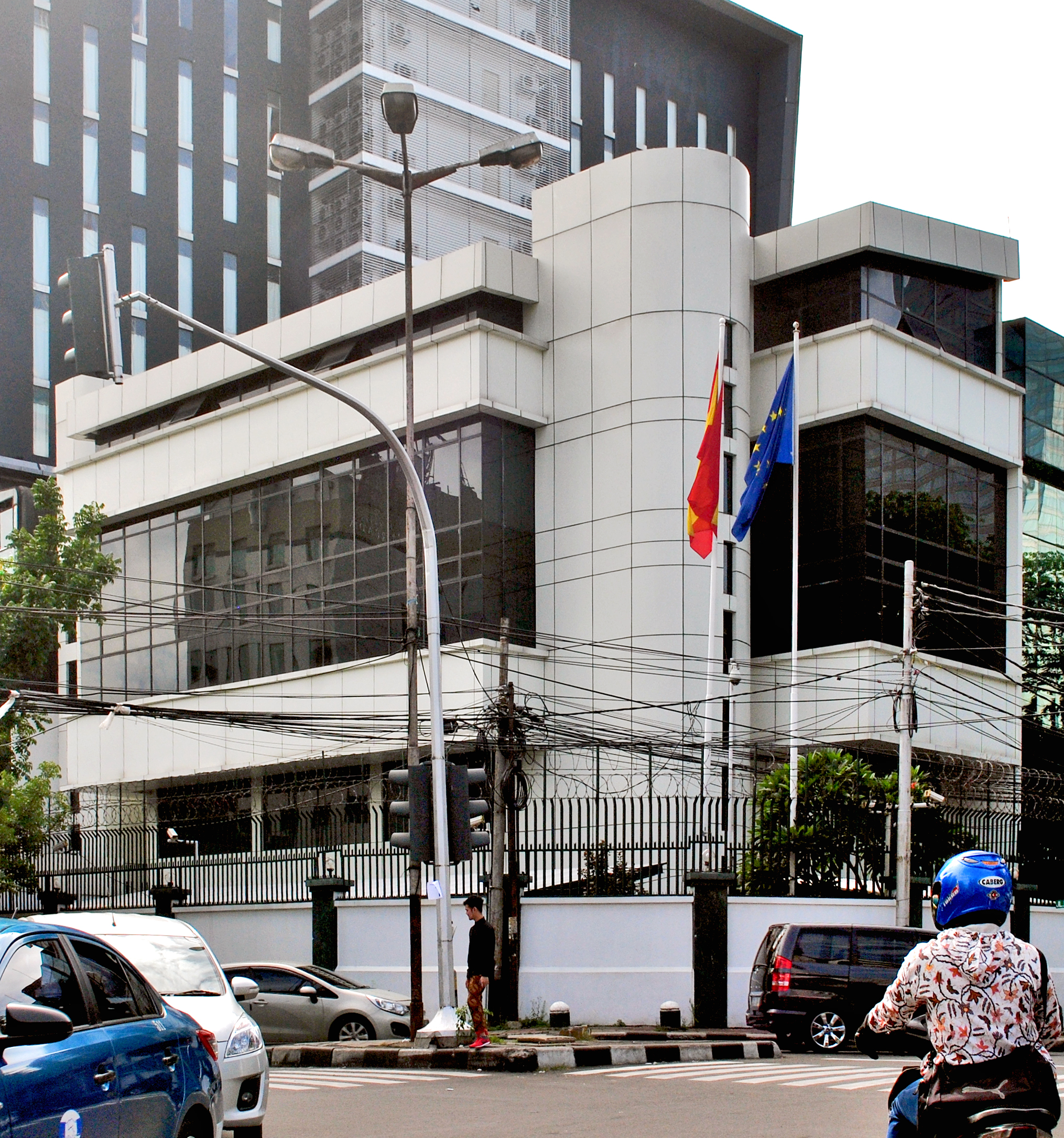 Kedutaan besar Spanyol